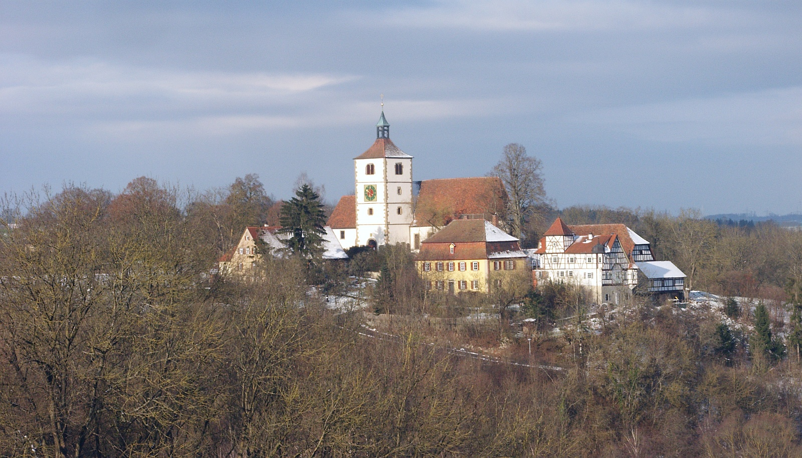 Stöckenburg (St. Martins Church), Vellberg, Germany